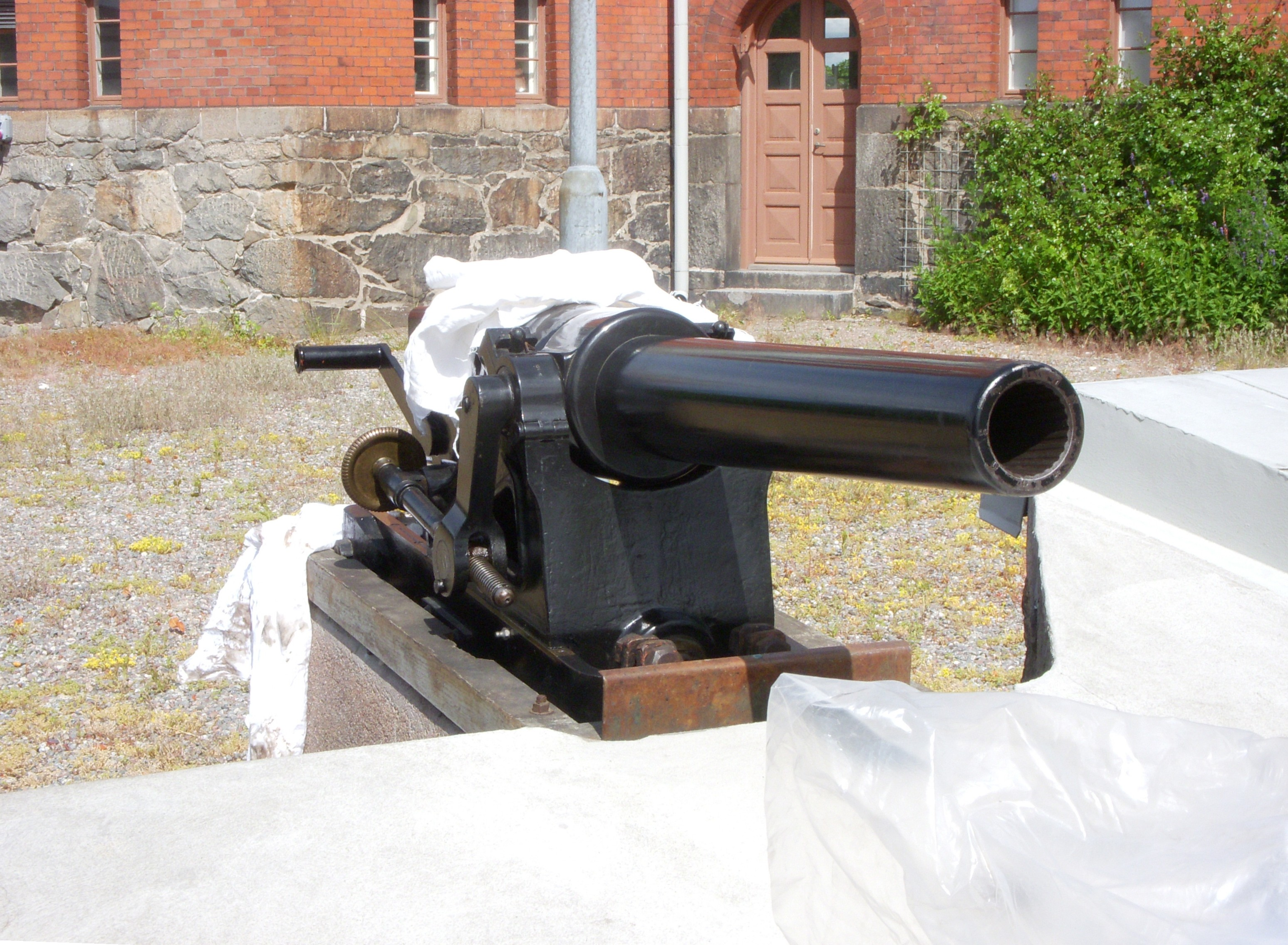 En av Kastellets fyra salutkanoner